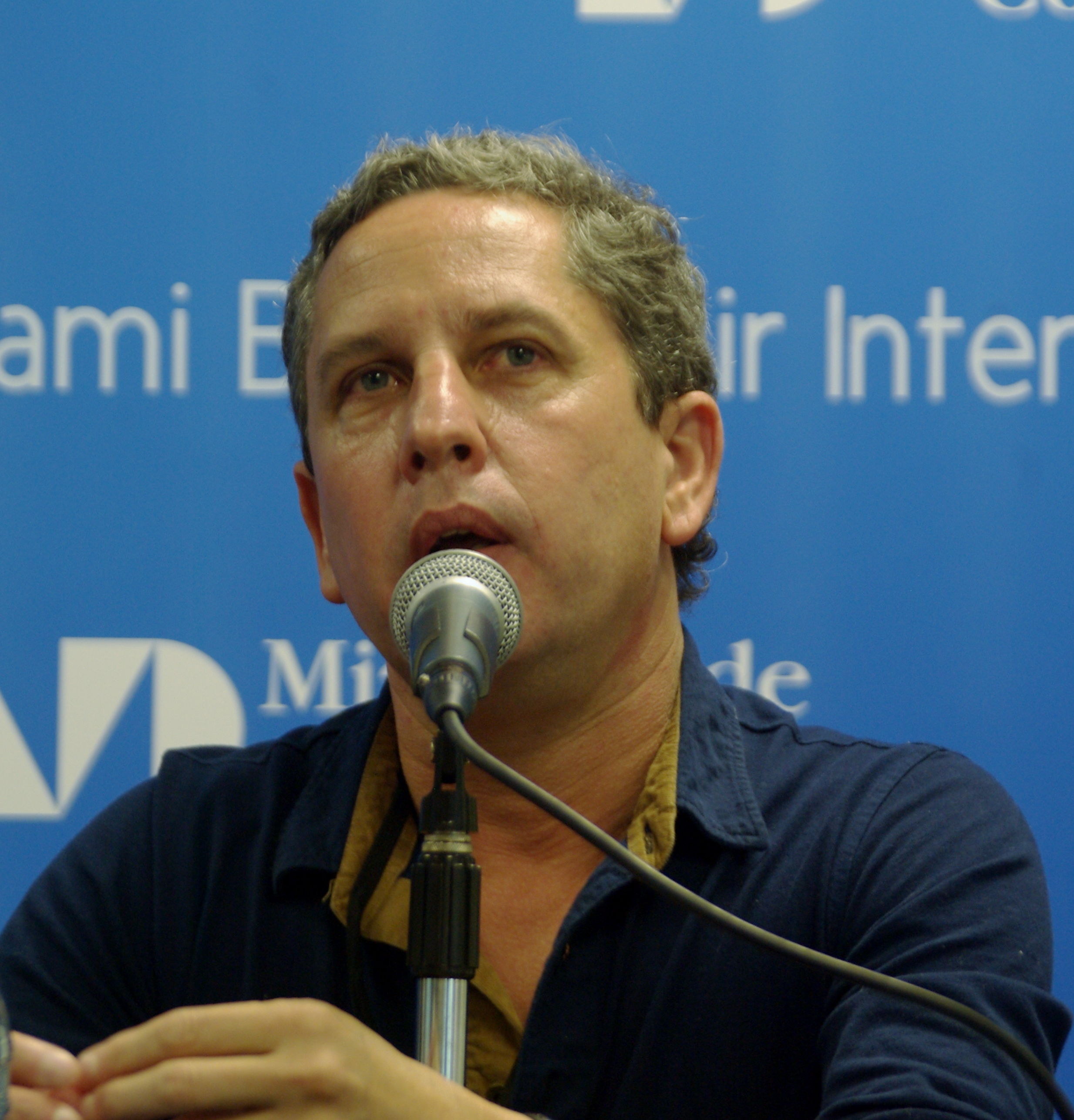 El escritor argentino Guillermo Martínez en la Feria Internacional del Libro de Miami, 2014